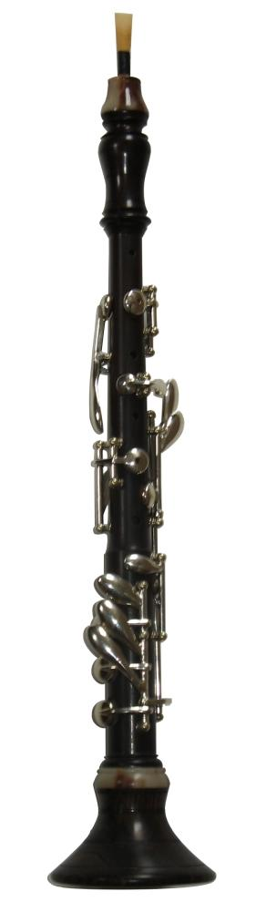 Bombarde chromatique en ébène, luthier Axone. Propriétaire : Christophe MORVAN.